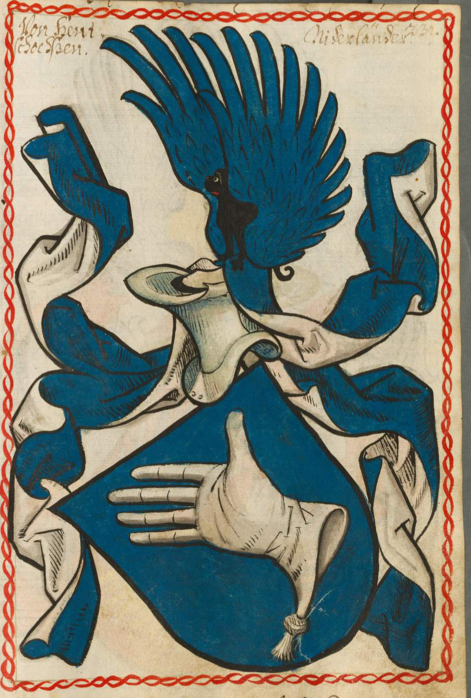 Scheibler'sches Wappenbuch , älterer Teil Niederländer Seite 231